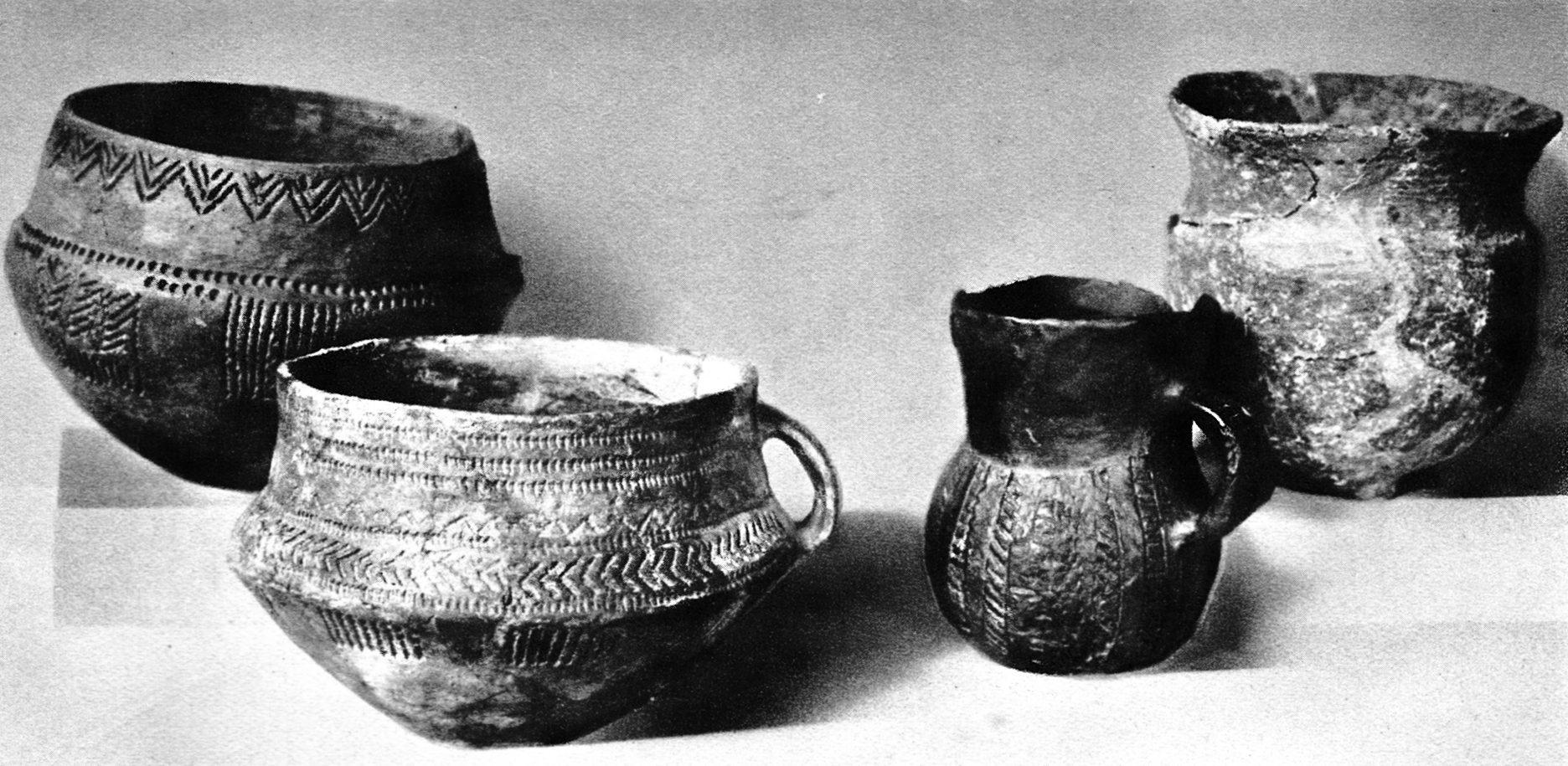 Gefäße aus hannoverschen Großsteingräbern der Trichterbecherkultur. Von links nach rechts: Sommerbeck bei Bleckede, Driehausen bei Osnabrück, Döse bei Ritzebüttel, Loccum bei Wunstorf